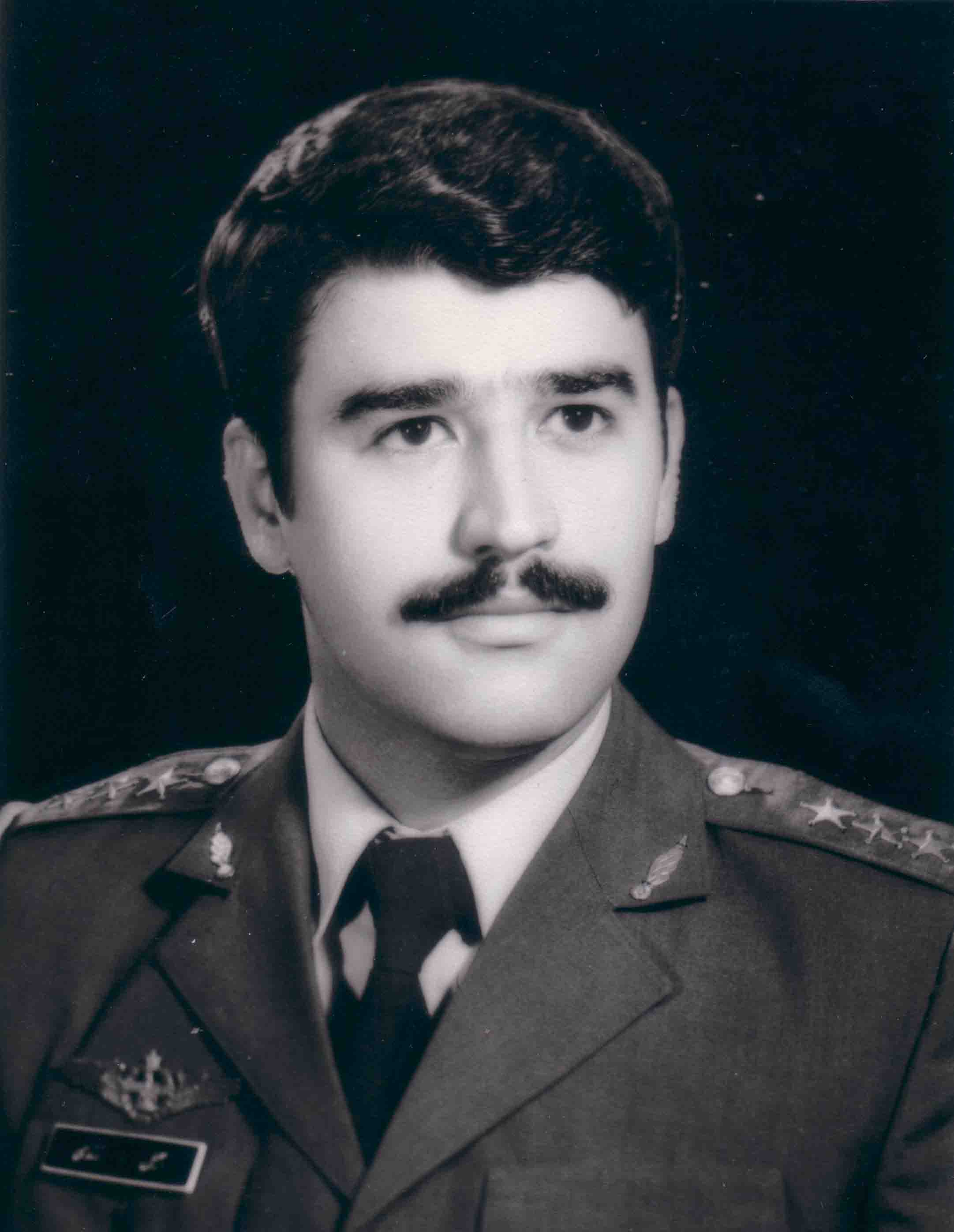 Jalil Zandi